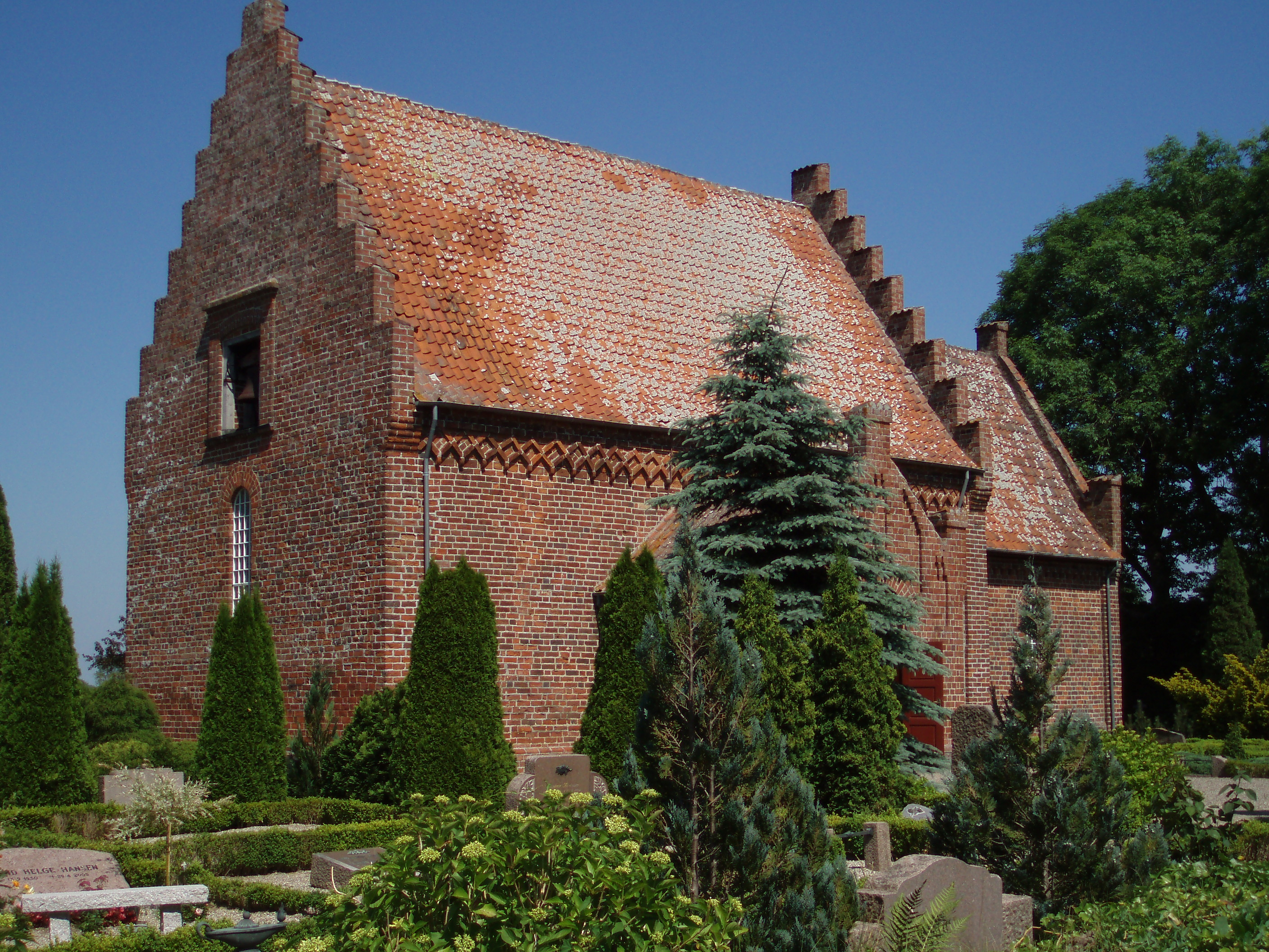 Bursø Kirke set fra sydsiden.